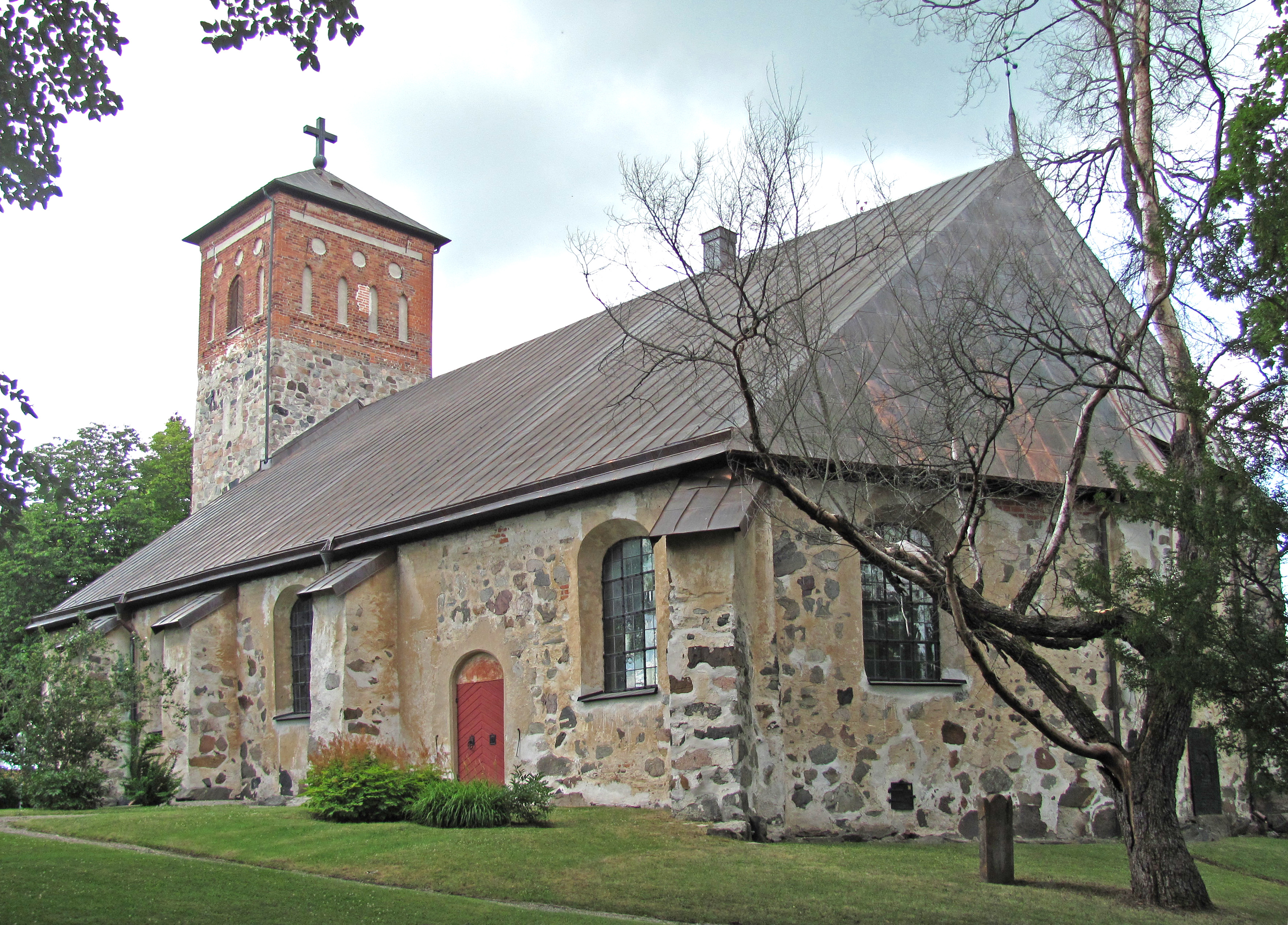 Sankt Nicolai kyrka, Arboga